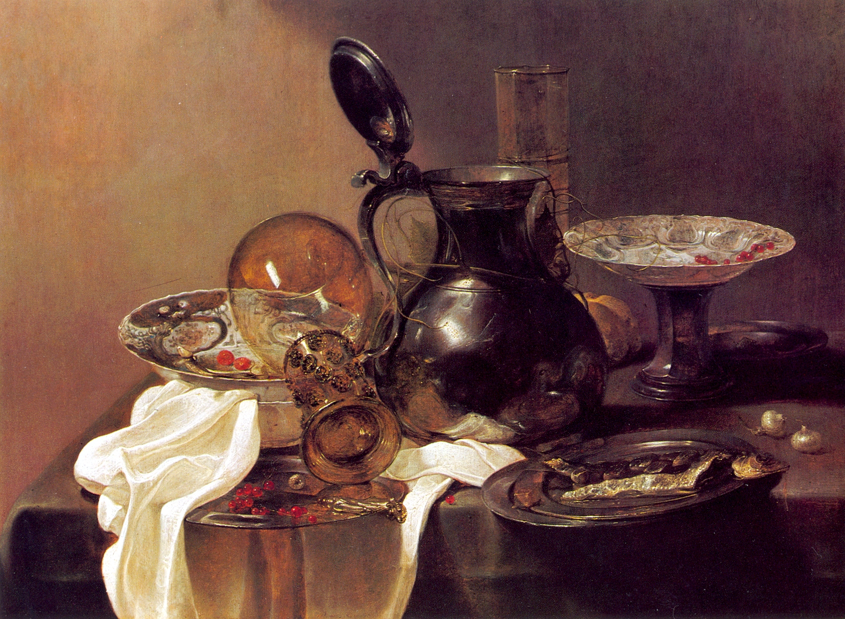 Stillleben mit Porzellangeschirr, Gläsern und Zinnkanne ca. 1640 (altern. 1639-1641) 56,5 x 76,4 cm Öl auf Holz Privatbesitz kleine Eule auf dem Henkel der Kanne vermutlich von Jan Jansz. den Uyl begonnen und durch Jan Jansz. Treck beendet